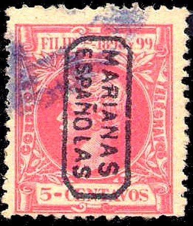 Estampilla española de las Islas Marianas de valor facial de 5 cent del año 1898-99 color fucsia con resello que se lee Marianas Españolas.